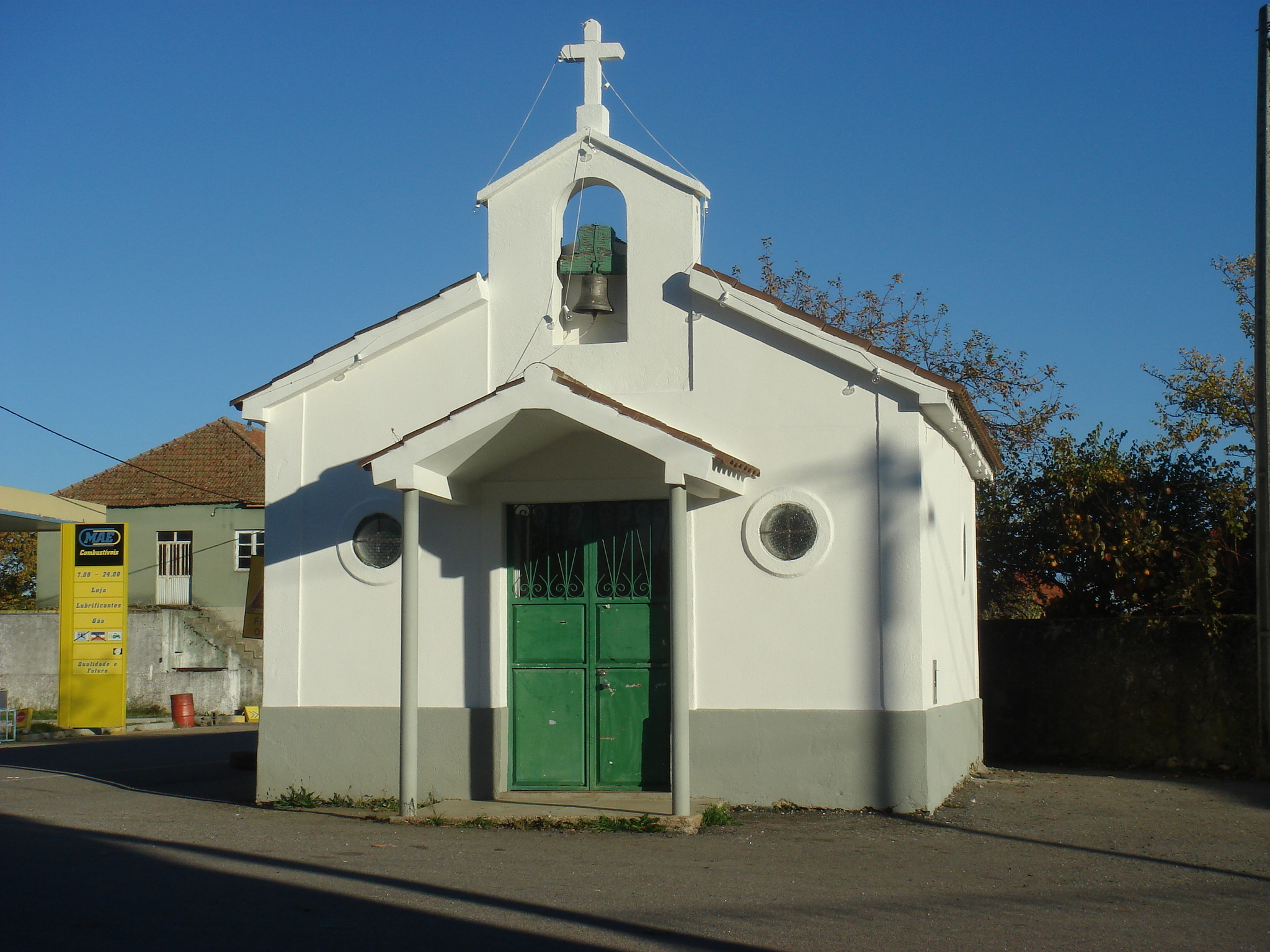 Capela de Paredes (freguesia de Parada - Bragança)